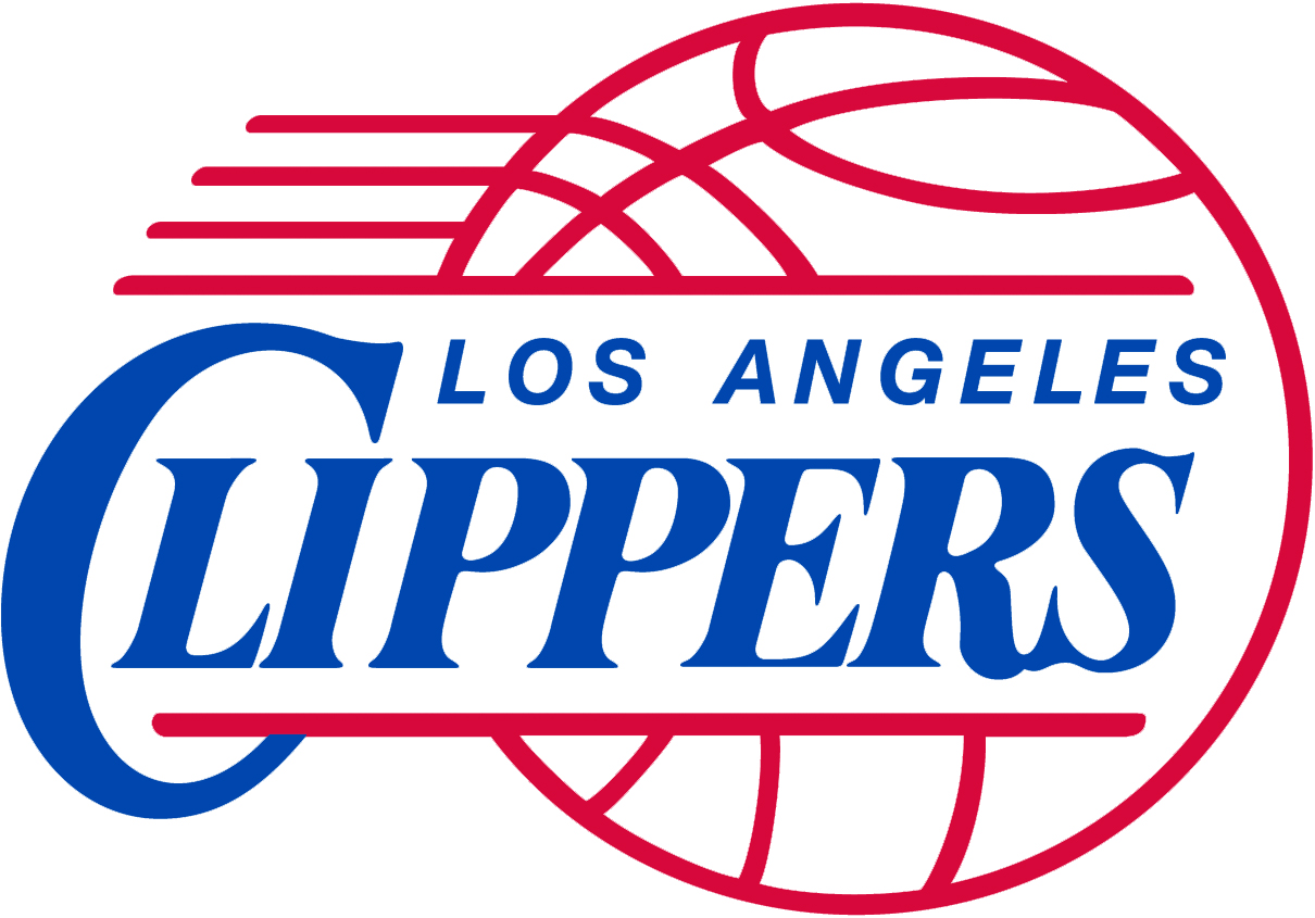 Los Angeles Clippers logo 1984-2010.png